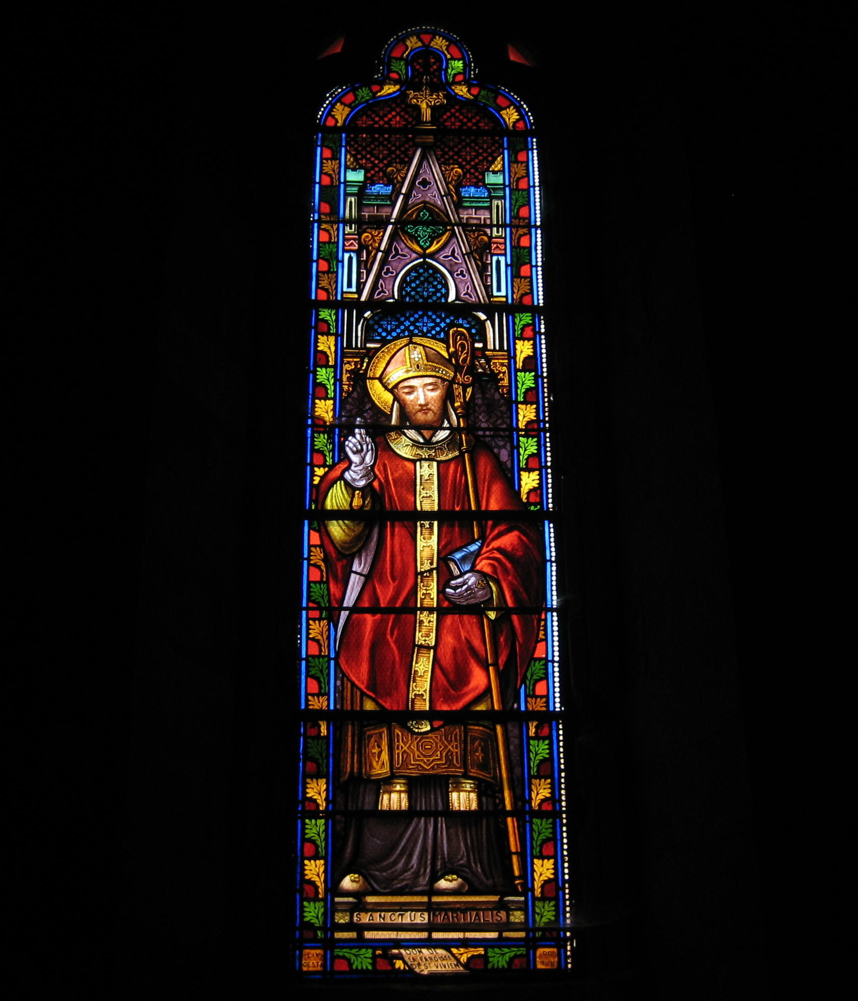 Kirchenfenster mit Bildnis des hl. Martial; Kirche von Salignac im Département Dordogne/Frankreich